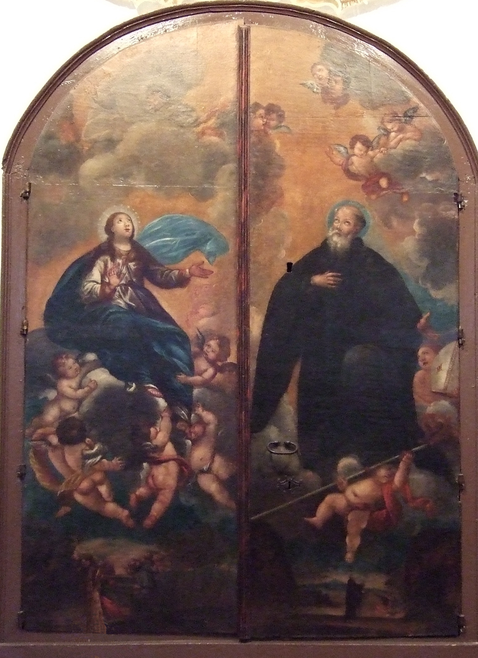 Francisco de Goya y Lucientes, Asunción de la Virgen y San Iñigo, puertas de armario; Identifican en Calatayud las primeras pintura de Goya que se conservan